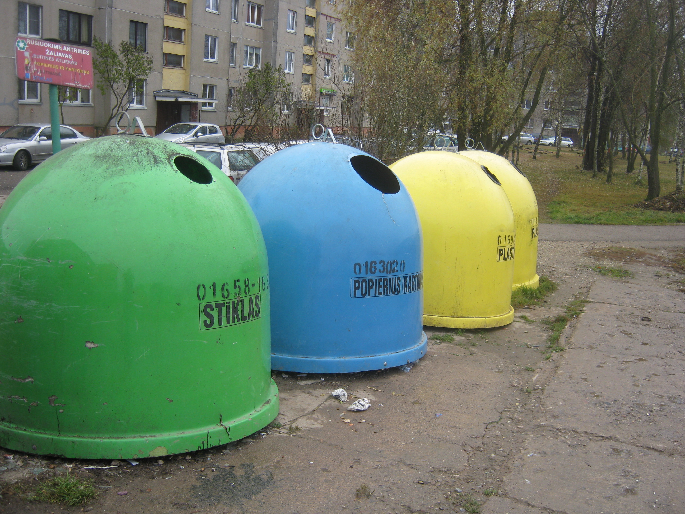 Jonava